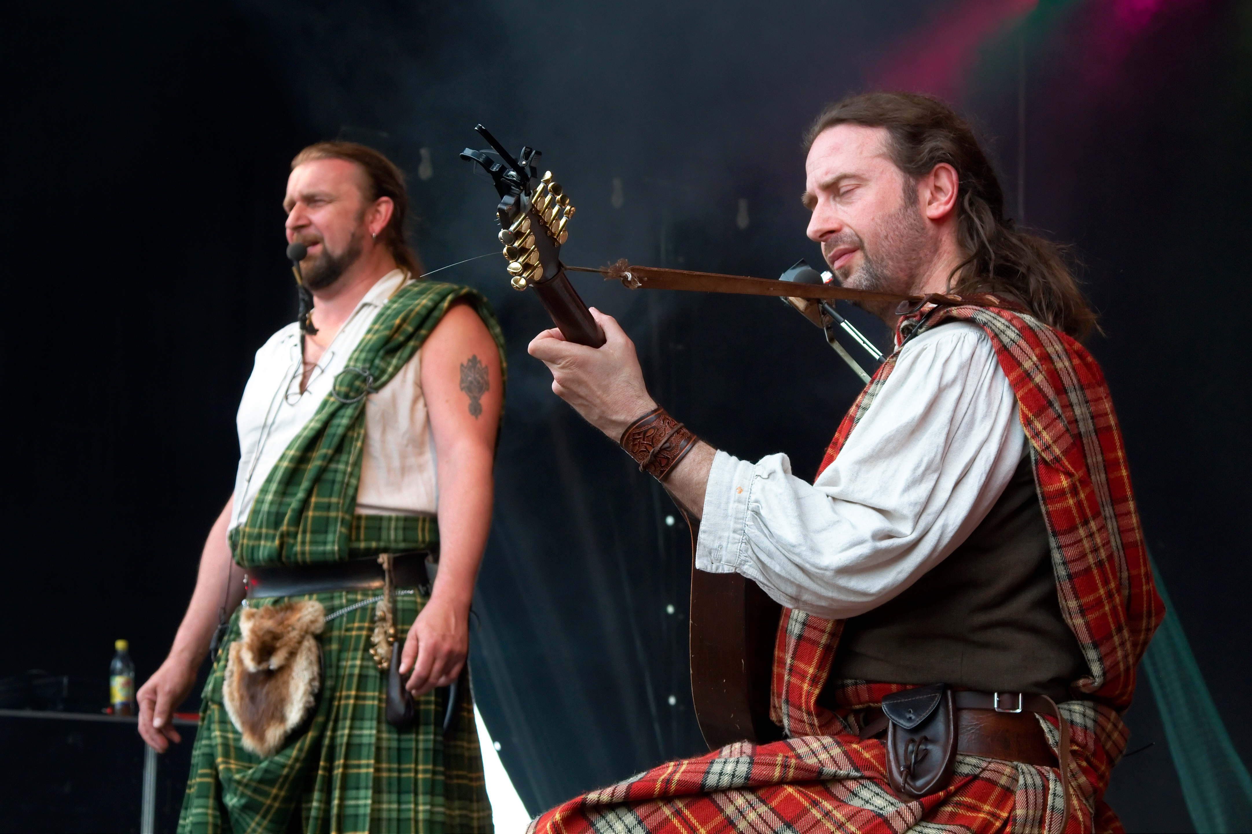 Rapalje